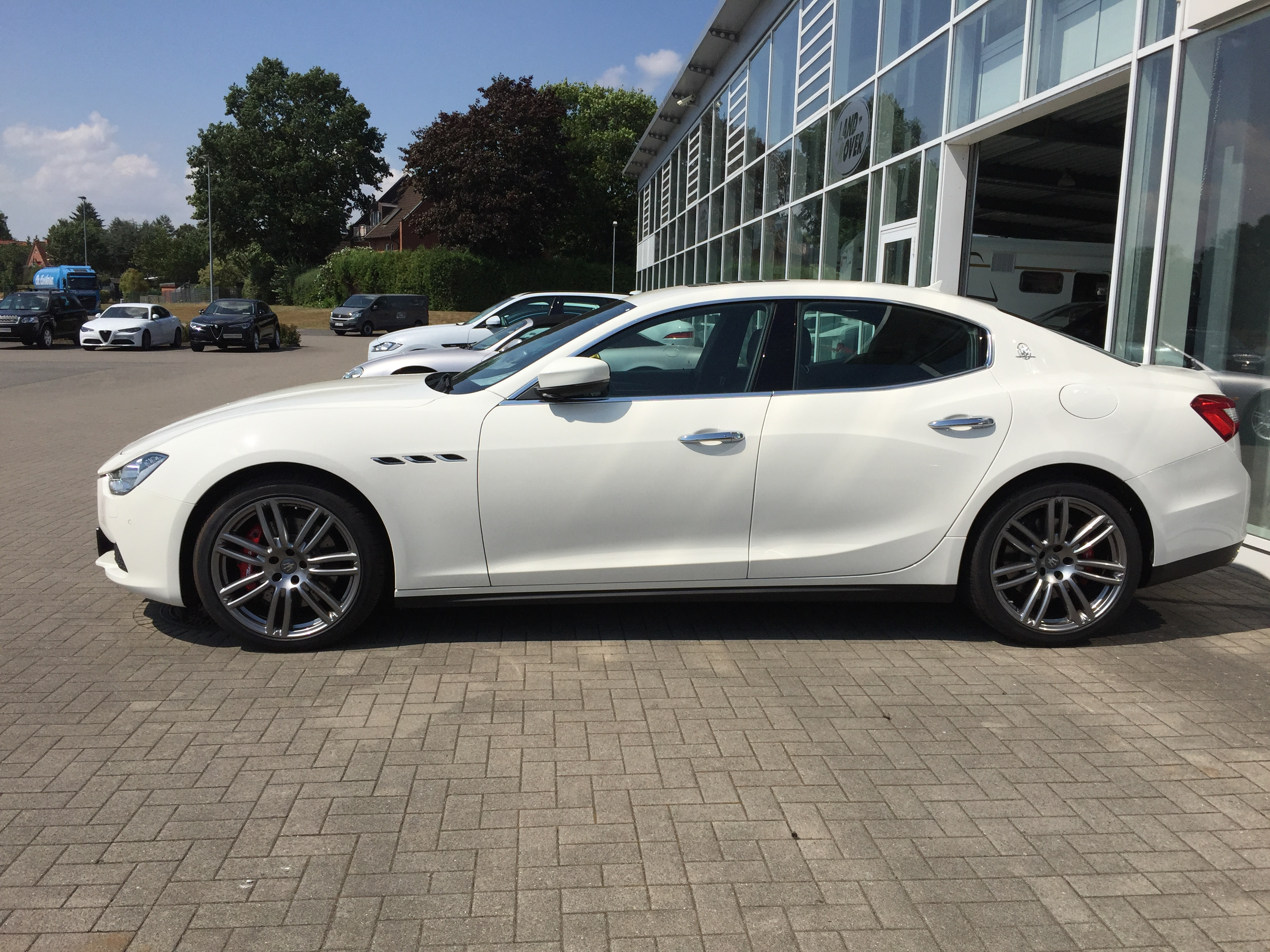 Maserati Ghibli Seitenansicht